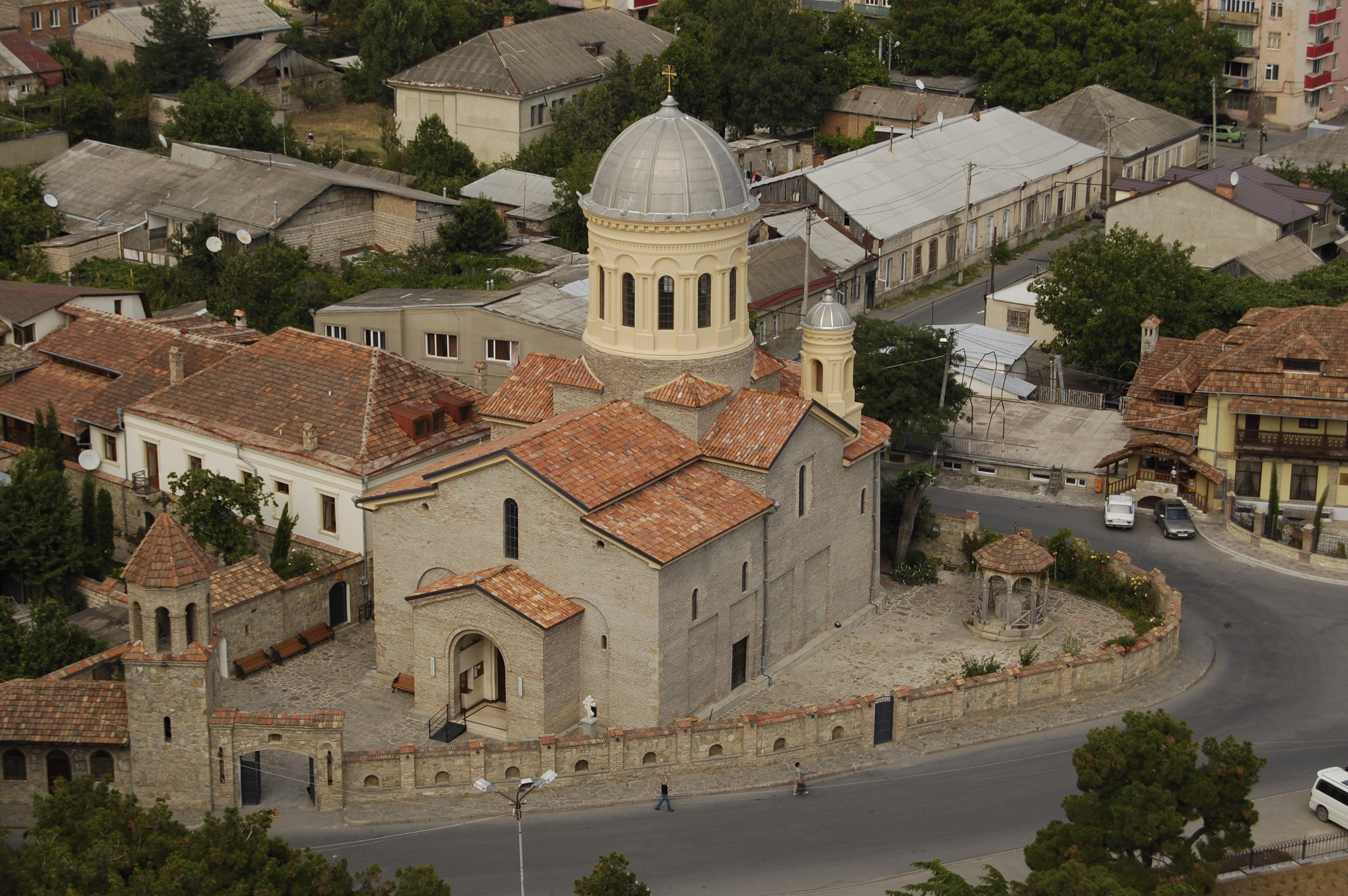 Gori Georgia - Sakartvelo